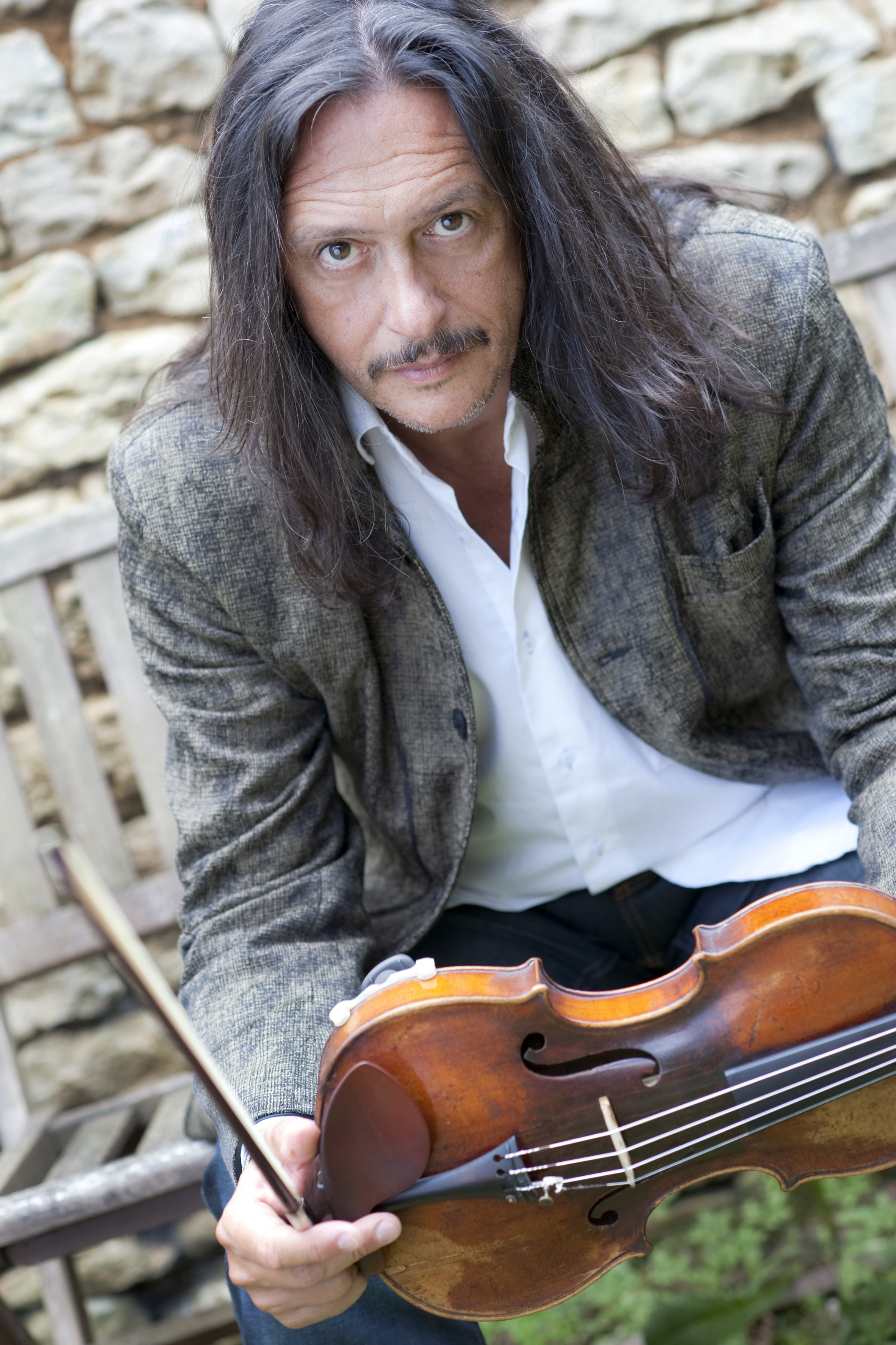 © Eric Legret (mention obligatoire)